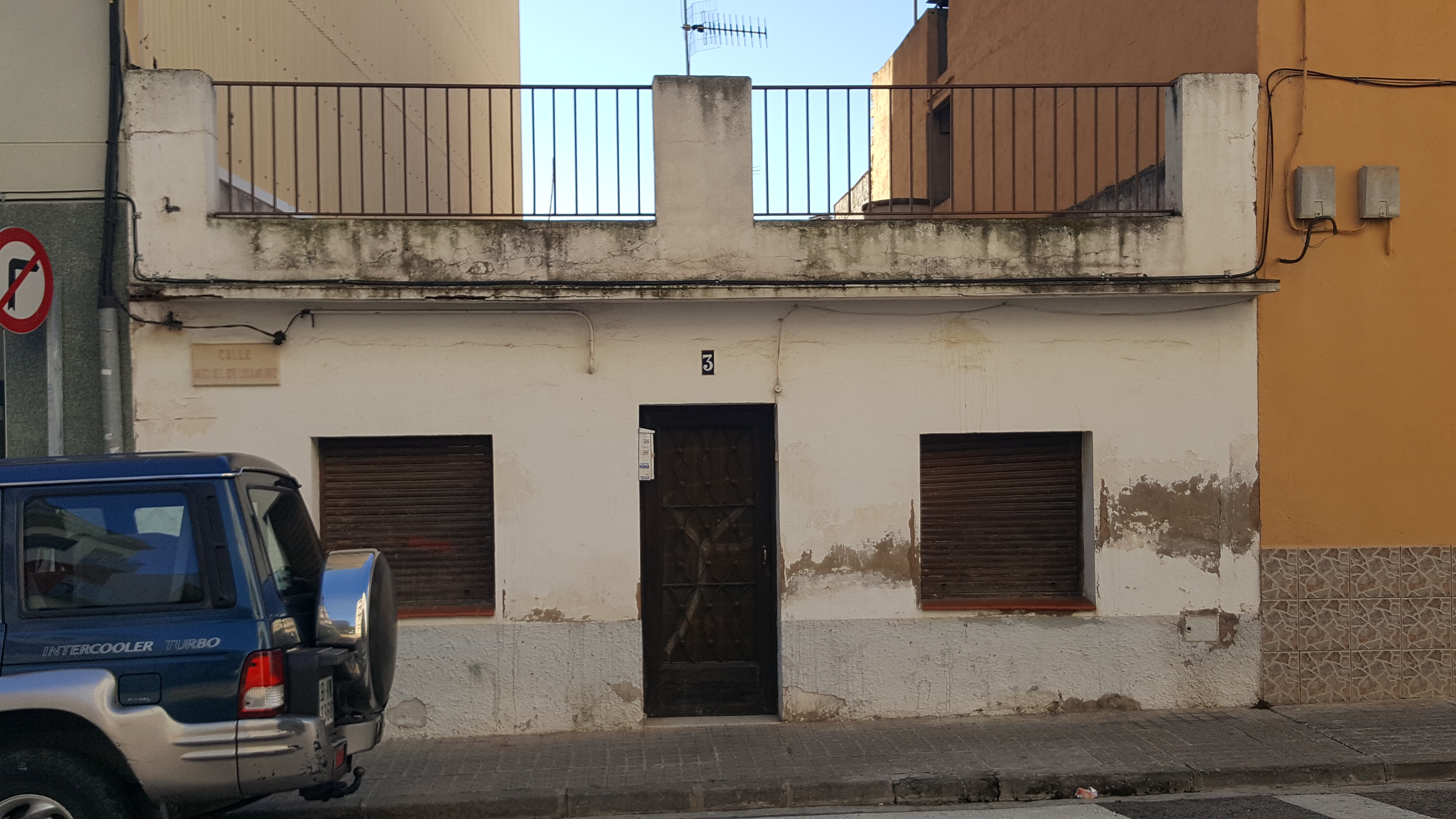 Casa situada al carrer Miguel de Unamuno. A la seva façana encara conté una de les primeres plaques de carrer que es van instal·lar a Les Roquetes.